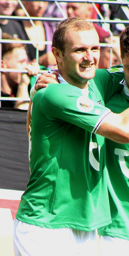 Константин Рауш 2011